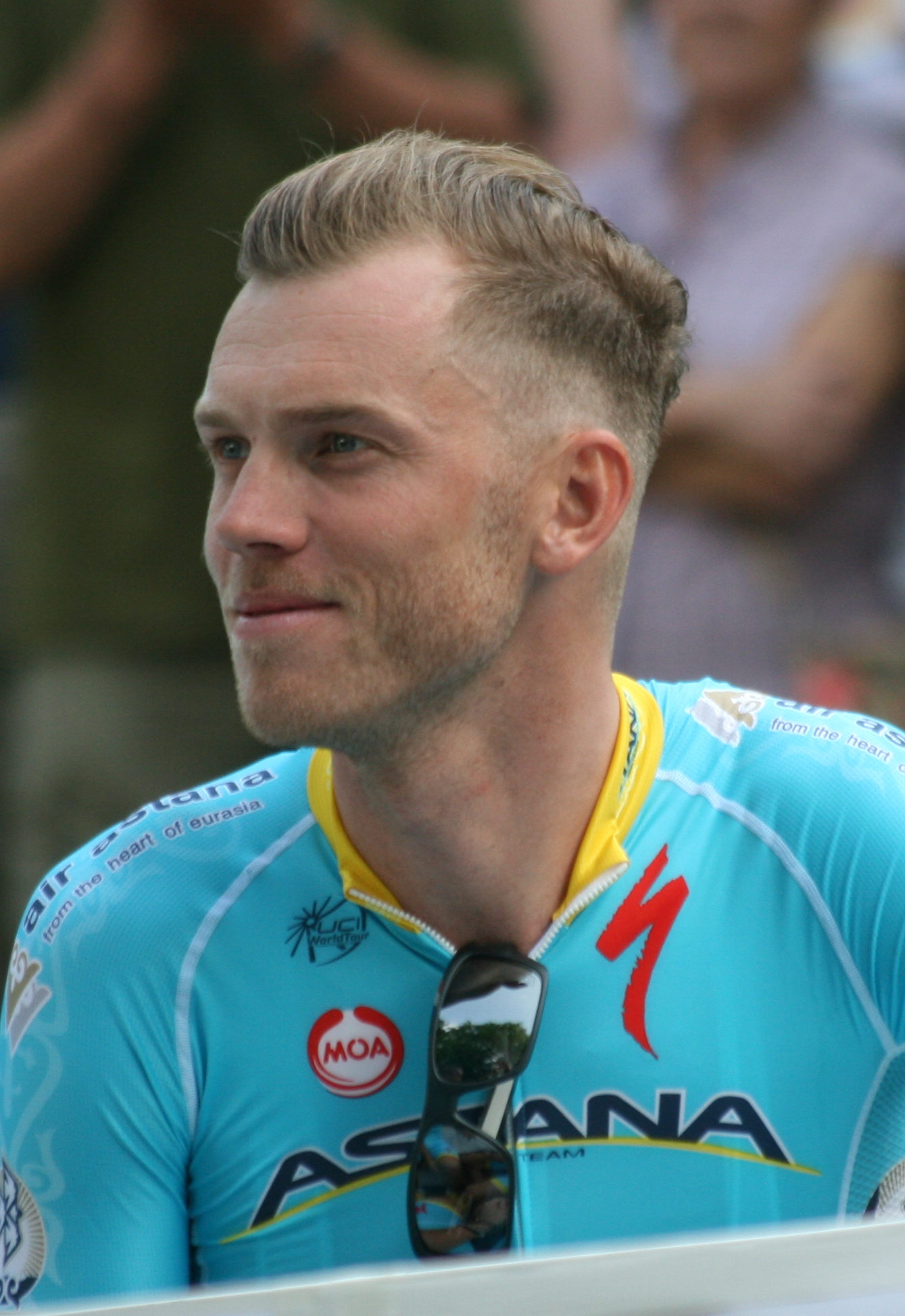 ploegenpresentatie Tour de France 2015 Utrecht